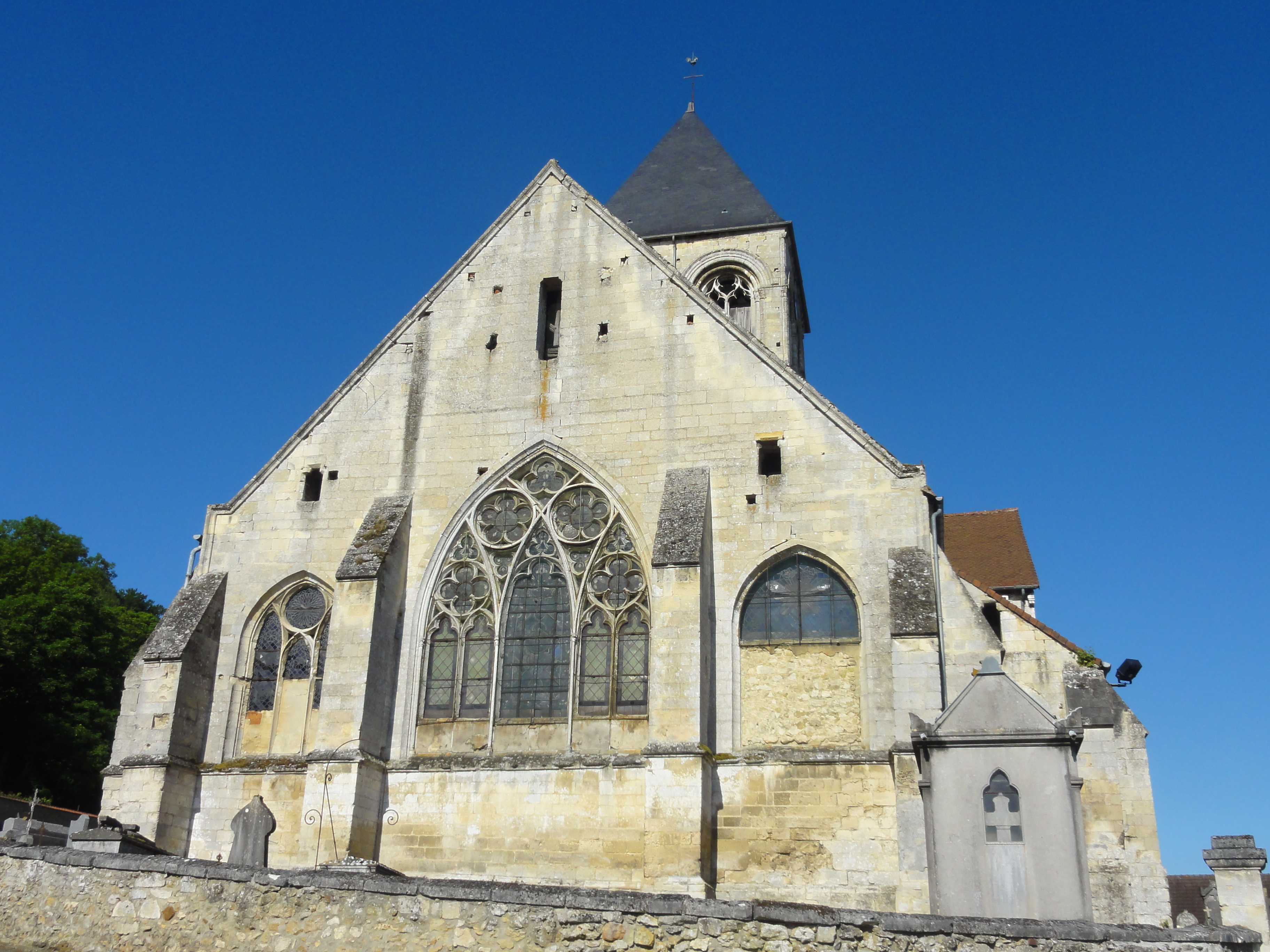 Chevet.